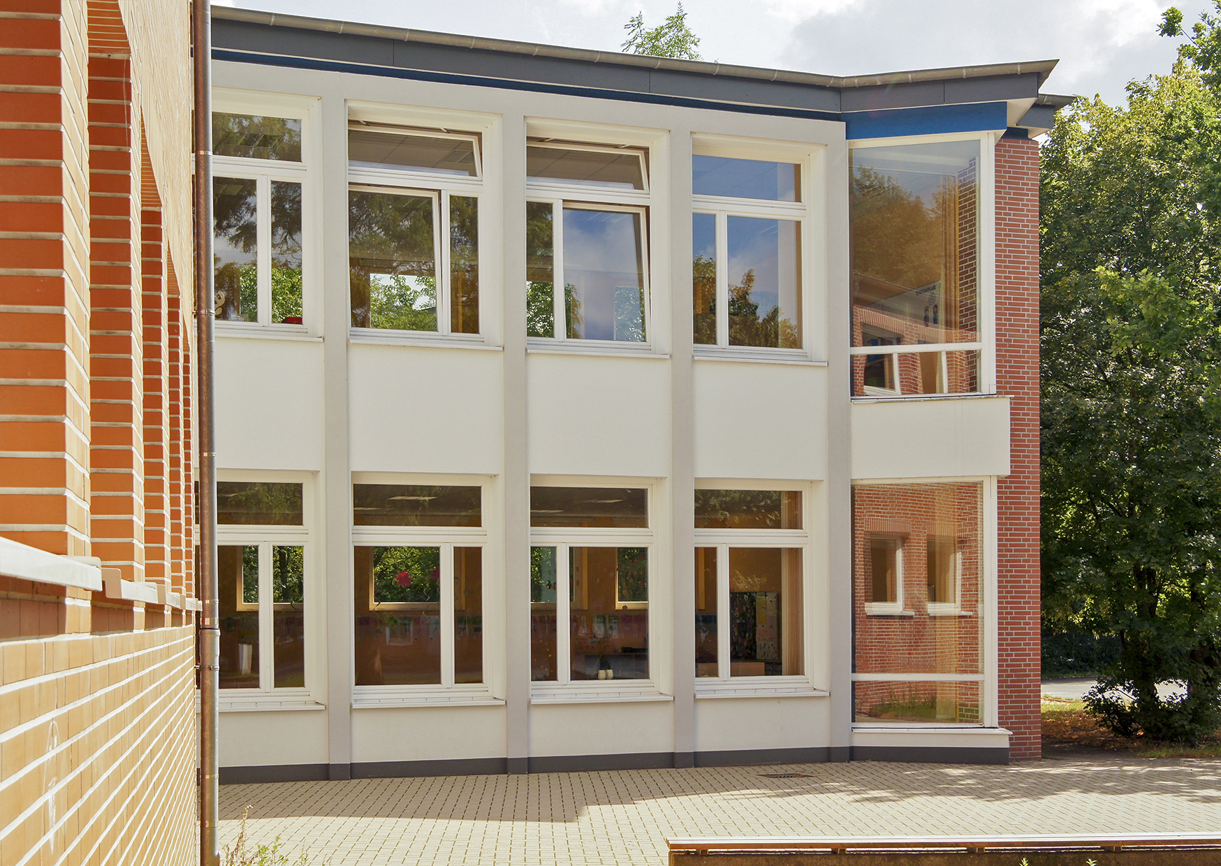 Schule im Marsseler Feld, Schule Landskronastraße in Bremen, Landskronastraße 46Das abgebildete Objekt ist ein geschütztes Kulturdenkmal in der Freien Hansestadt Bremen, mit der Nr. 2361 beim Landesamt für Denkmalpflege registriert.